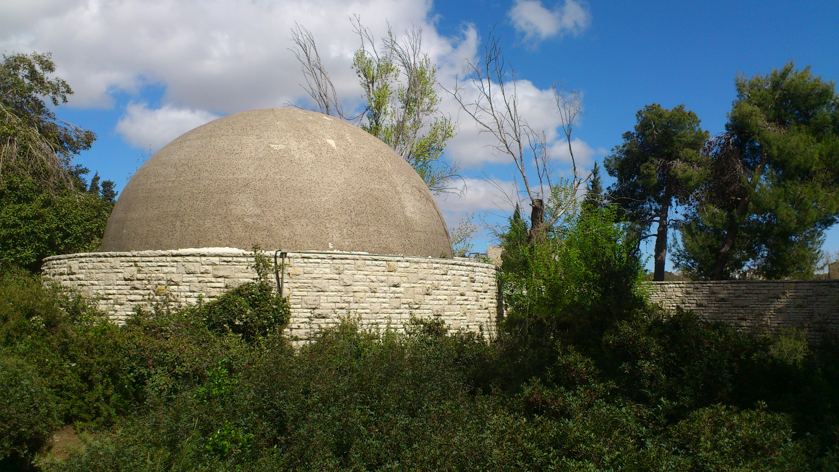 Planetarium Williams